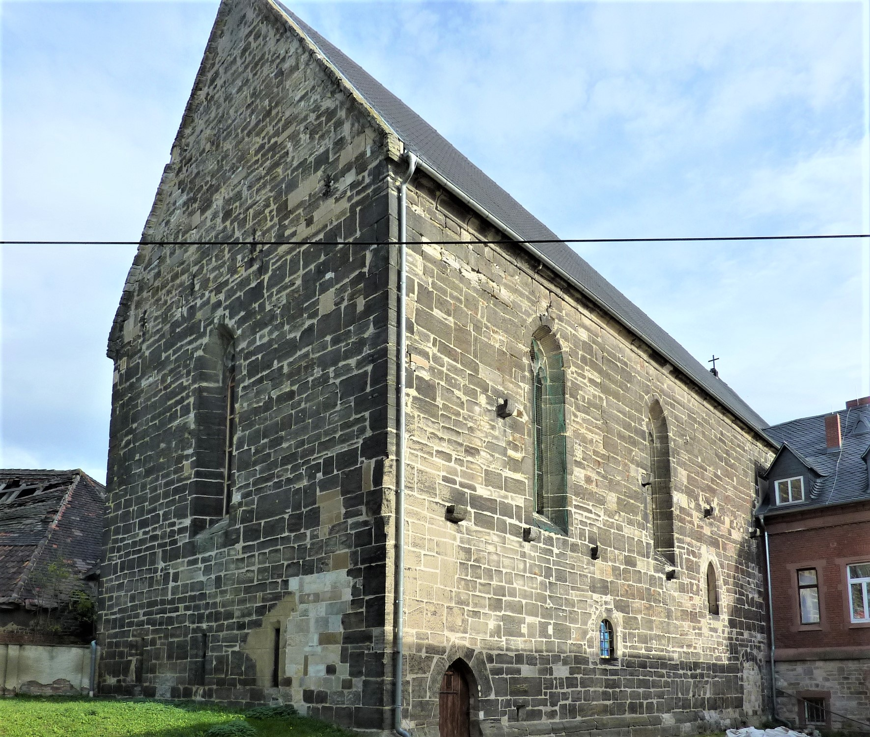 Klosterkirche Langendorf